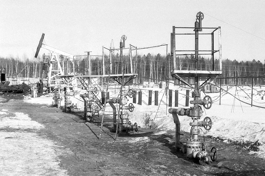 Petroleum_drills near Surgut, Russia (2000)